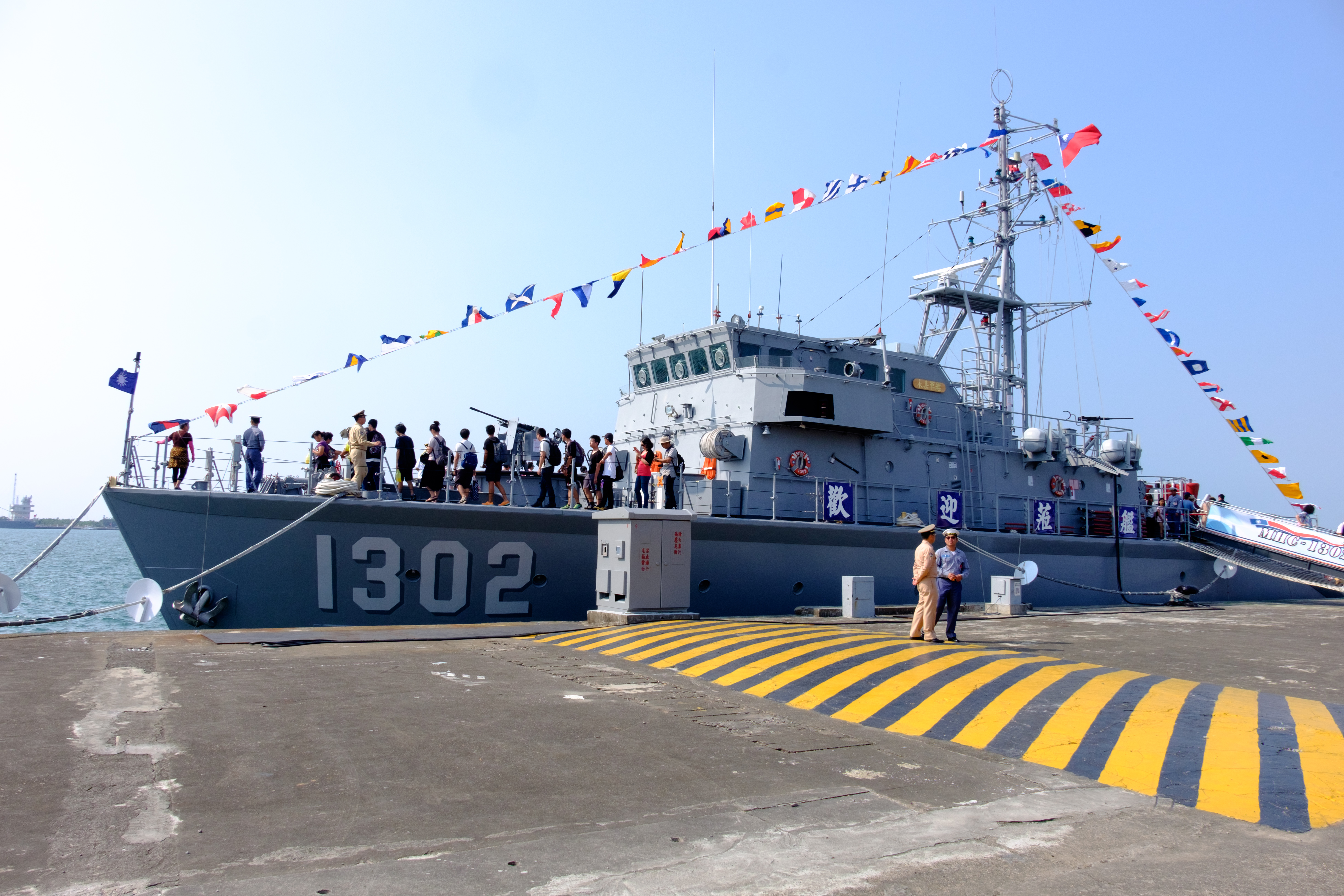 2016年左營軍港營區開放活動下午，東七號碼頭開放參觀中的永豐級獵雷艦永嘉（MHC-1302）。